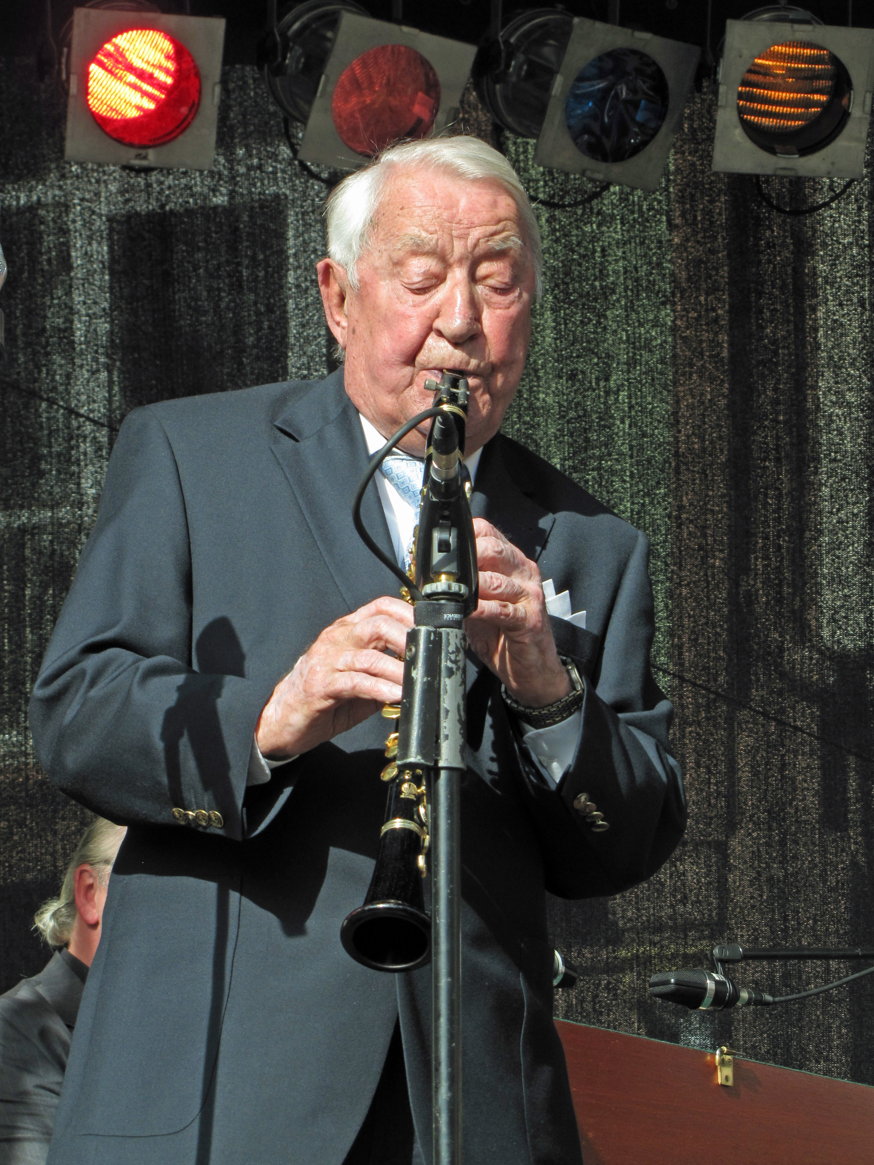 Hugo Strasser mit den "Red Hot Hottentots", bei "Jazz zum Dritten" 2013, auf dem Römerberg in Frankfurt am Main.